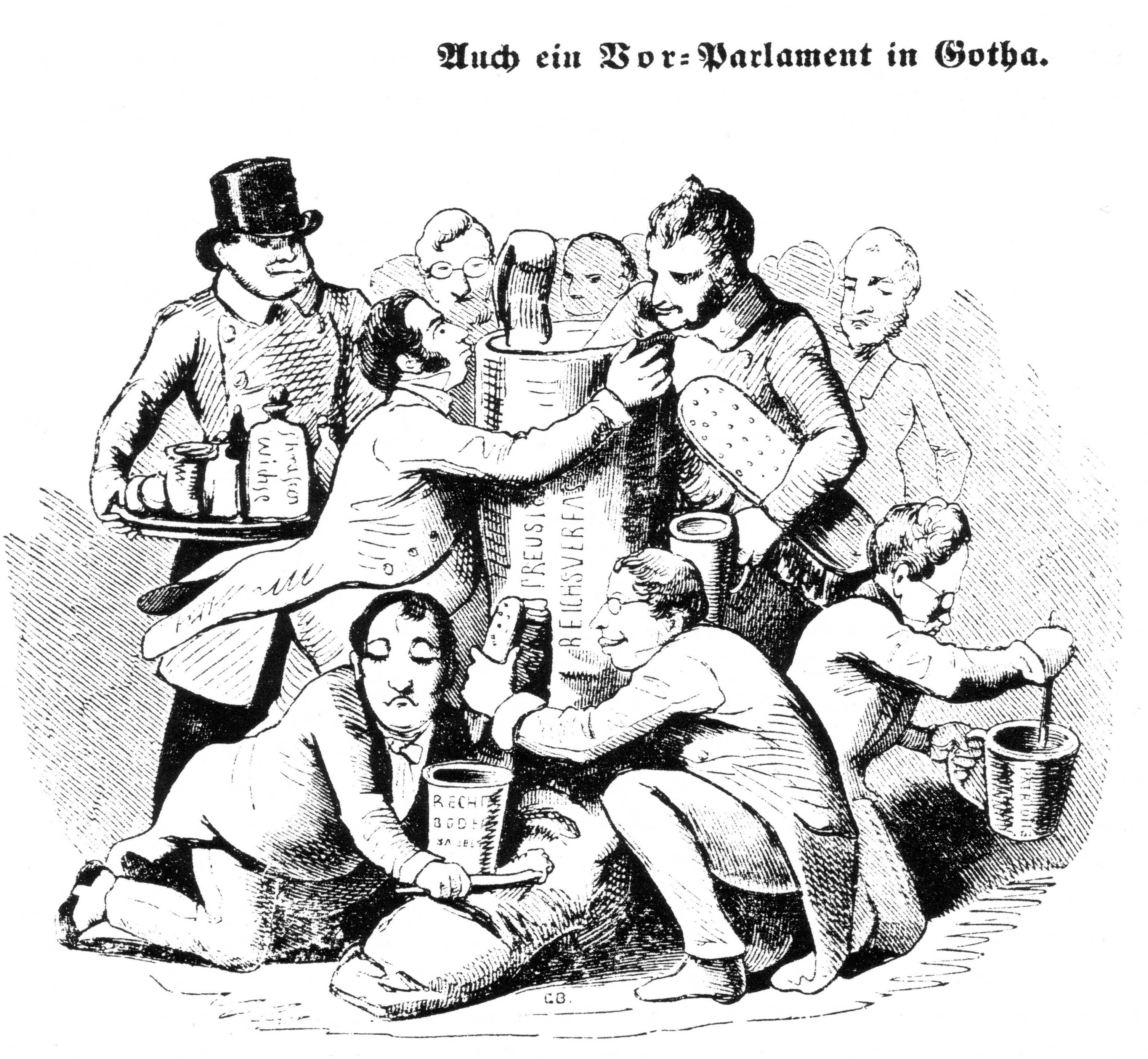 Karikatur: Gothaer, im Eulenspiegel. Juni 1849.